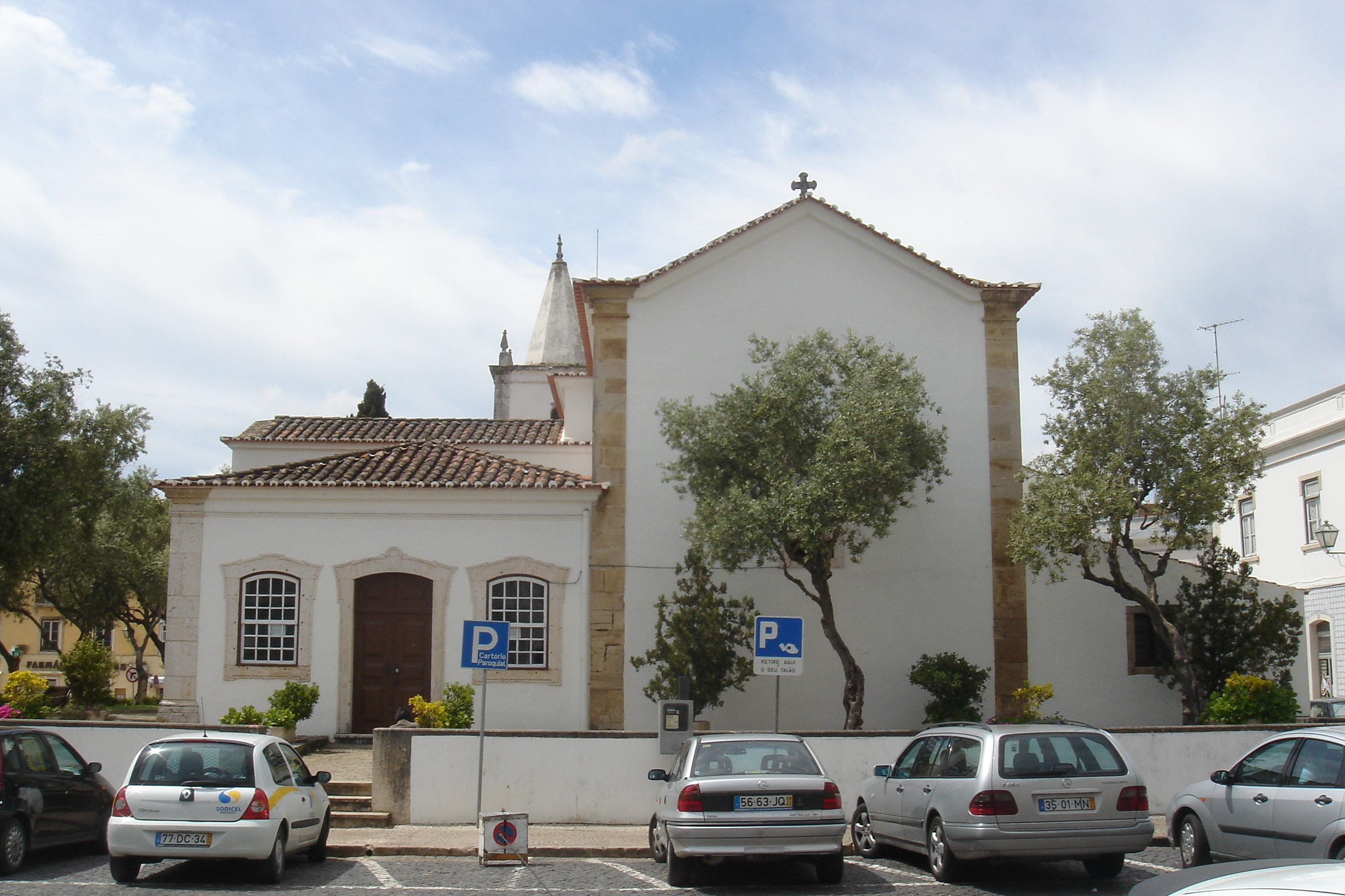 Rückseite der Kirche S. Pedro von Torres Vedras, links der Anbau, in dem 1929 das erste Museum der Stadt installiert wurde.